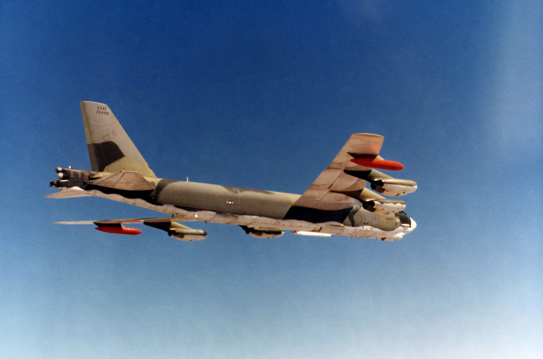 Boeing B-52G in flight